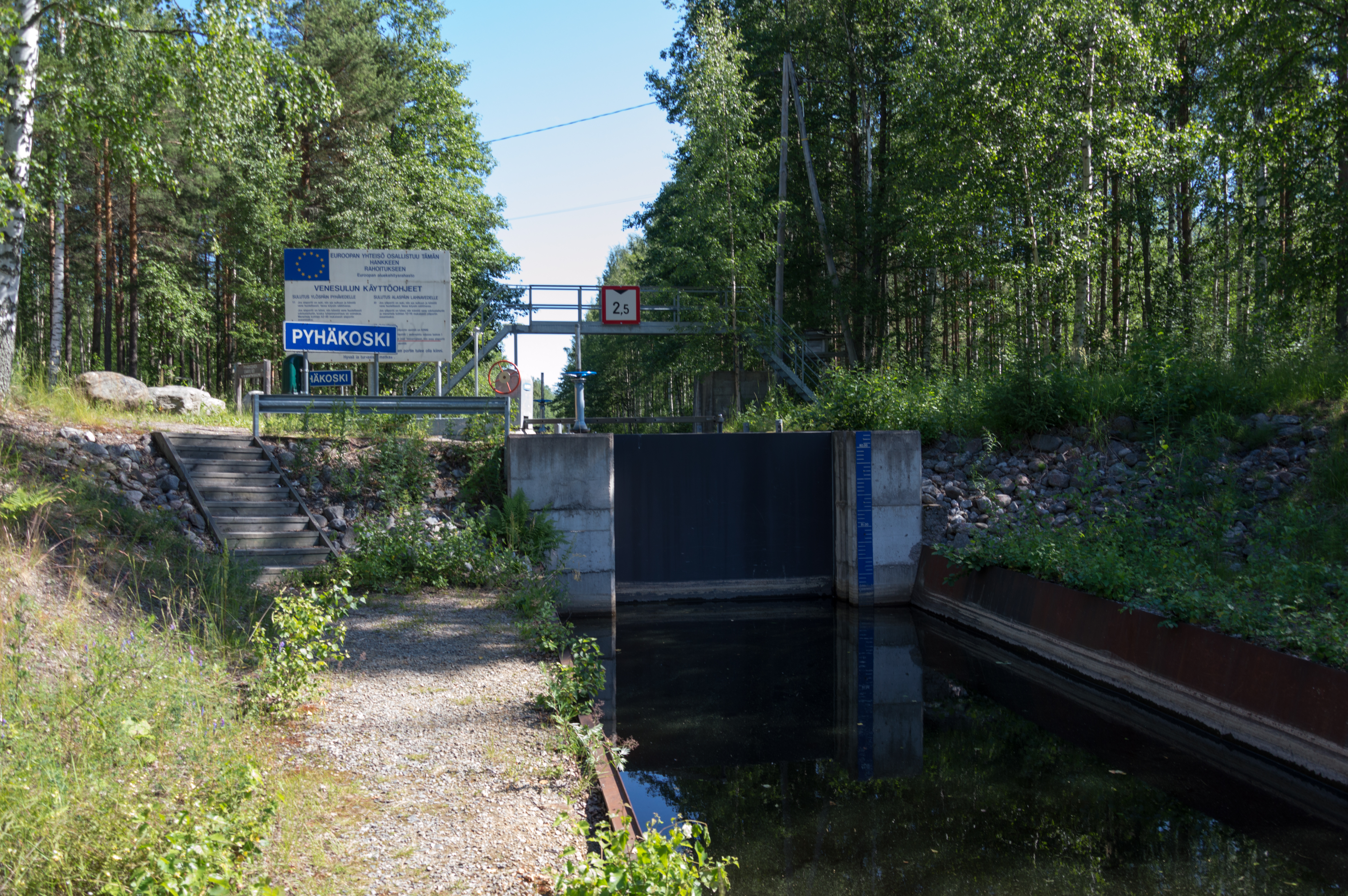 Pyhäkosken kanava Mantyharjulla